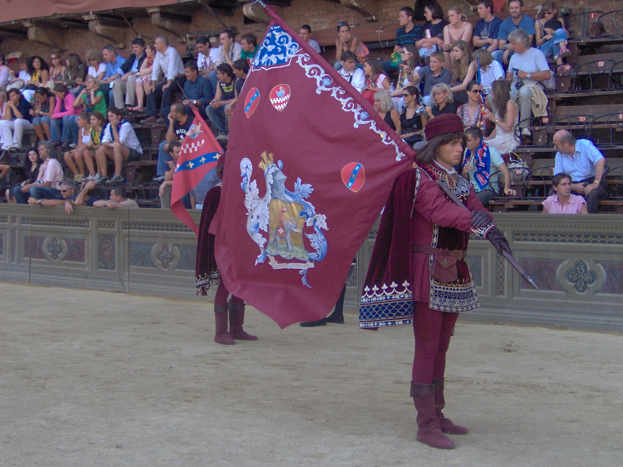 Image del corte del Palio di Siena - agosto 2006